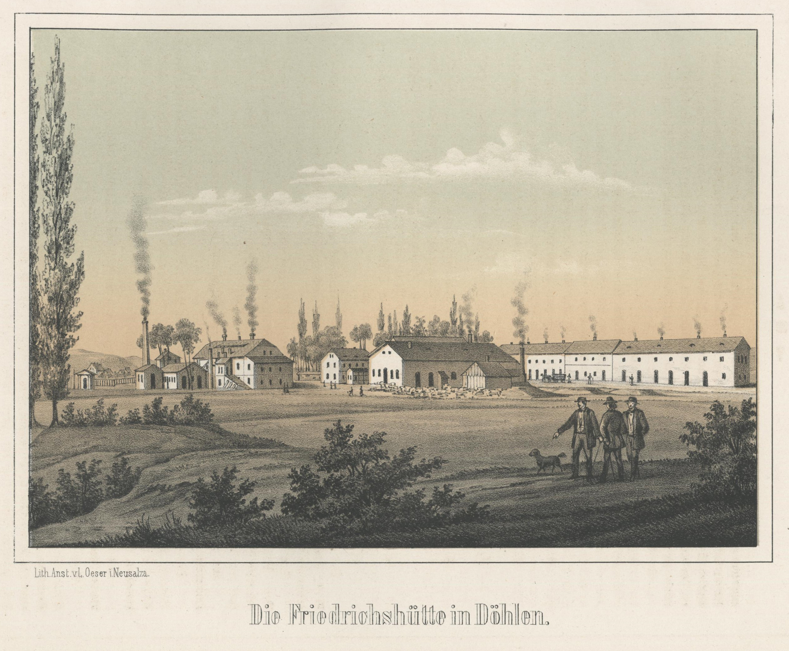 Die Friedrichshütte in Döhlen aus: Album der Sächsischen Industrie Zweiter Band